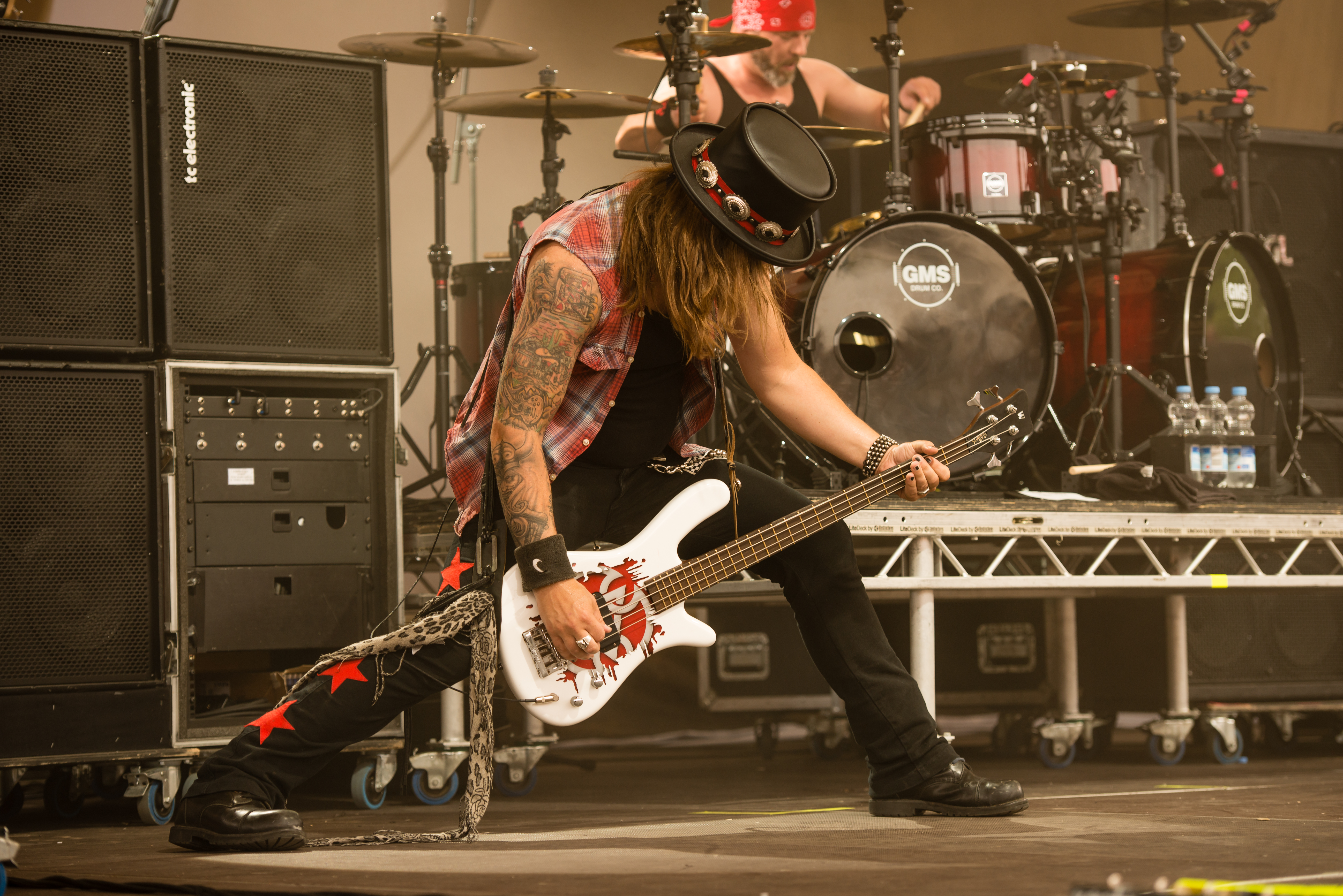 'Rock Hard Festival 2014 - Gelsenkirchen': 'Pretty Maids'